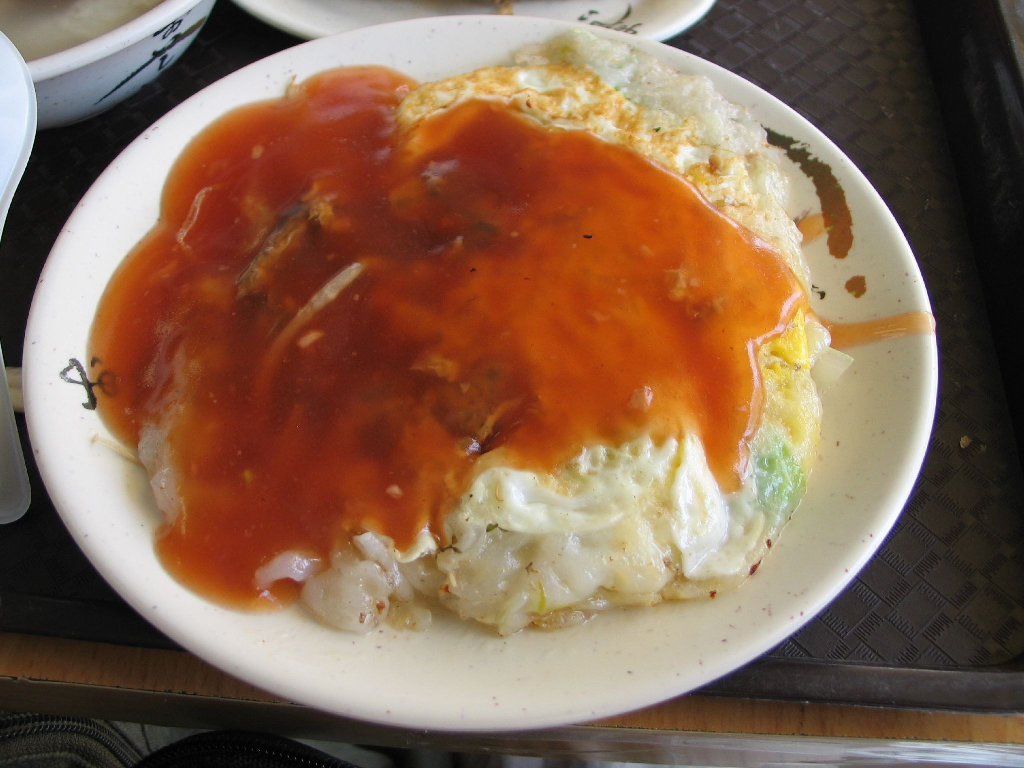 和一般在台北吃的很像，蚵仔給得算多，放的青菜是豆芽菜，蛋半熟！味道還OK，不難吃。蚵仔煎